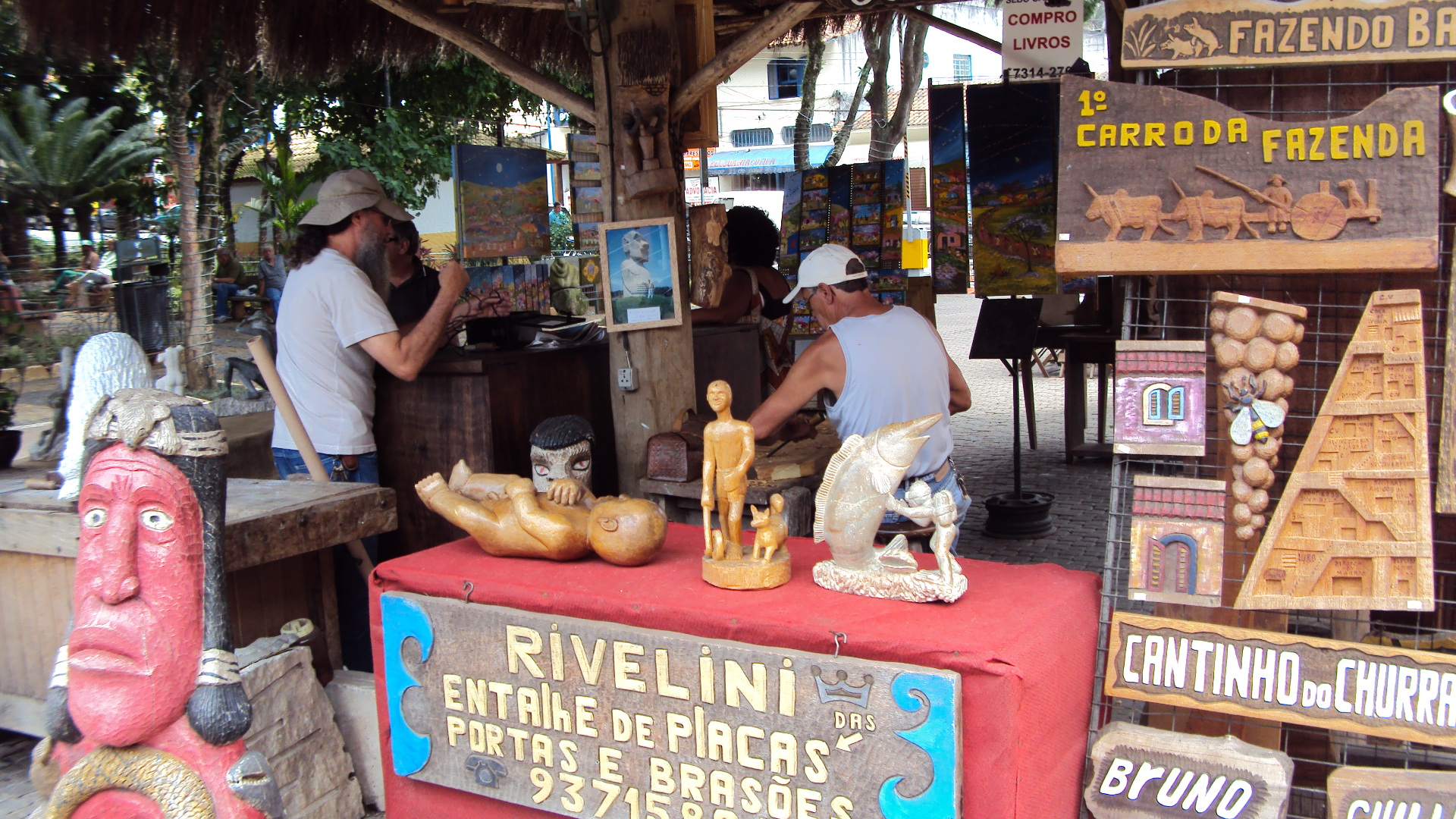 Artistas de Embu das Artes confeccionando seus trabalhos.